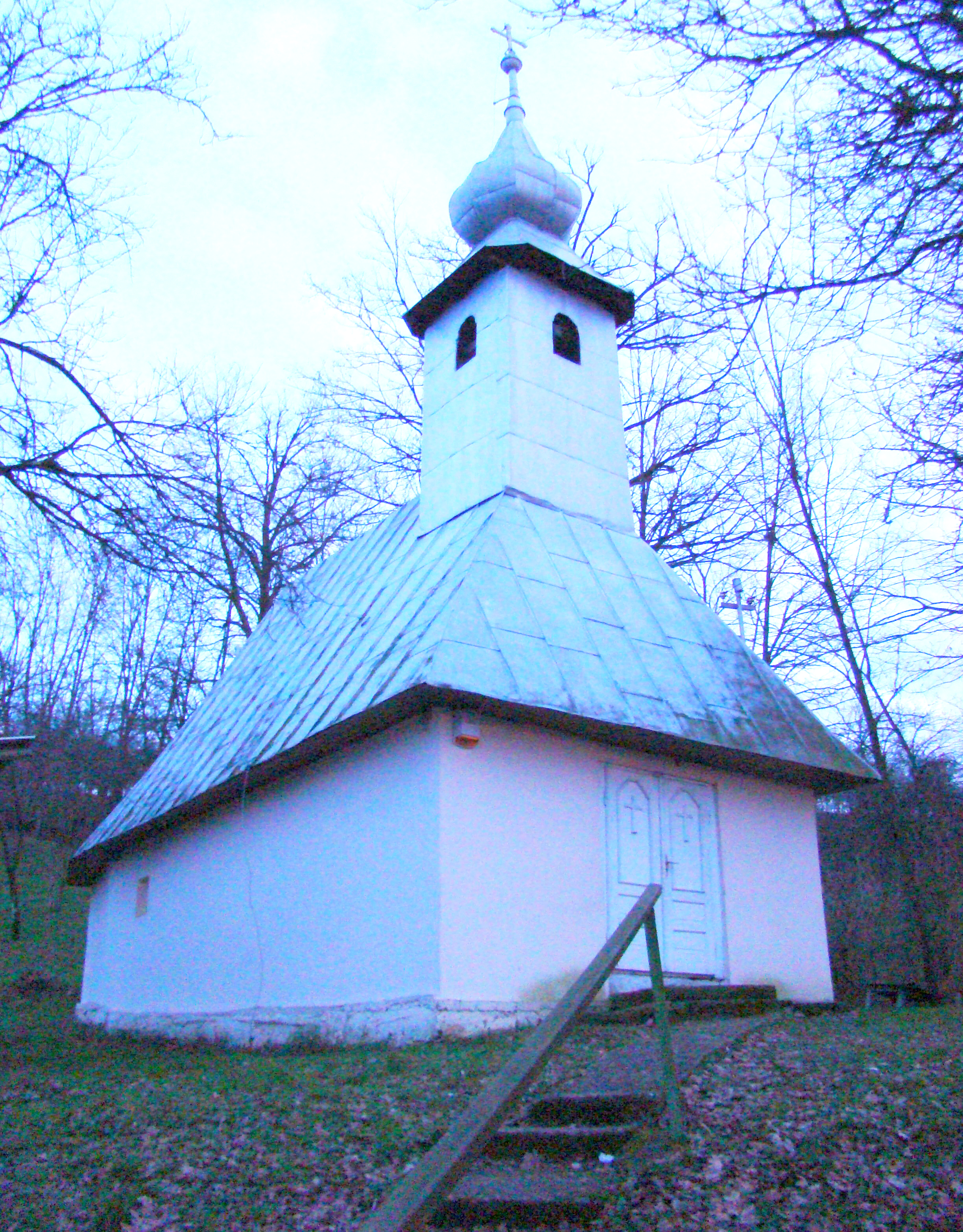 Biserica de lemn din Ogeşti, Bihor.